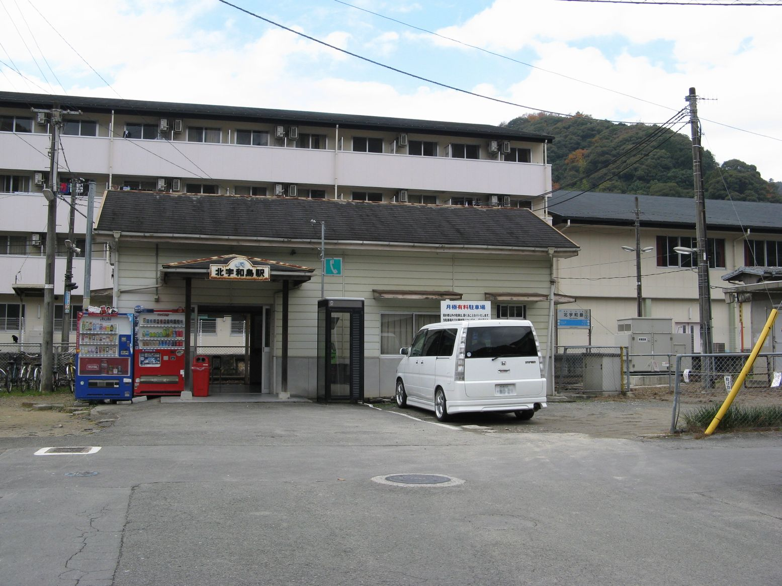 予讃線北宇和島駅 駅舎